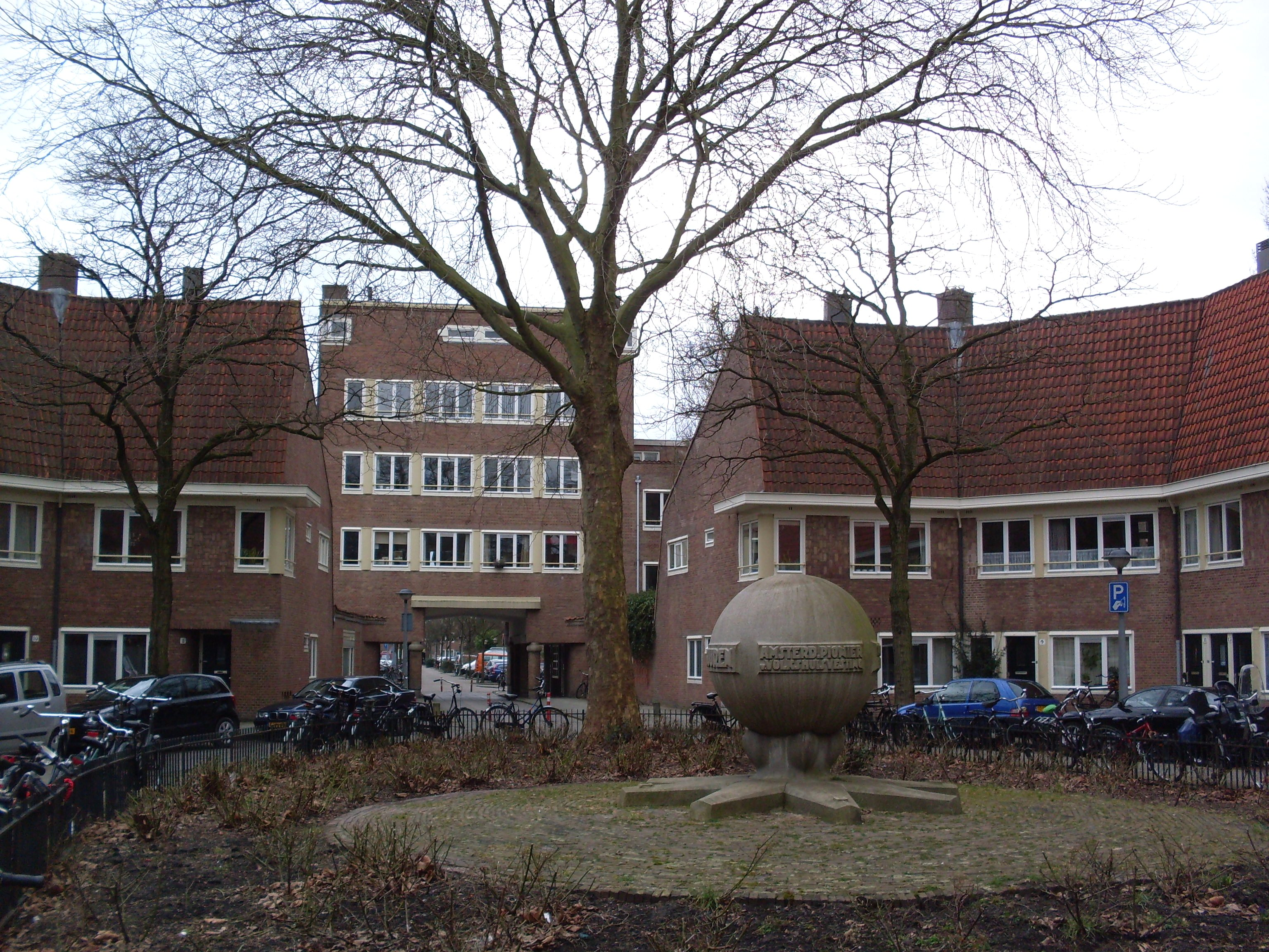 Cooperatiehof 1